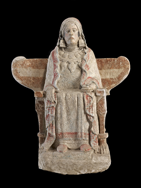 Dama de Baza (Cultura Ibérica). Número de inventario: 1969-68-155-123A.